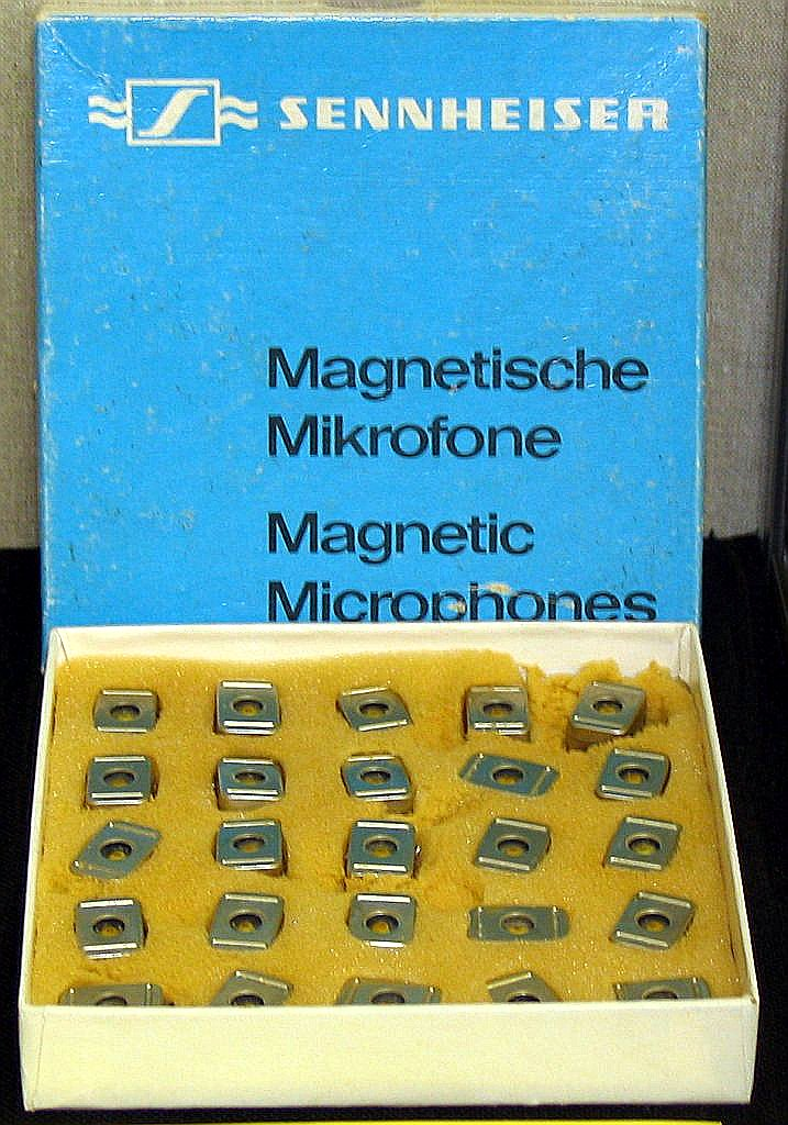 Eine Schachtel mit magnetischen Mikrofonen vom Typ Sennheiser MM 26. Diese wurden vom MfS für den Bau von Wanzen benutzt.